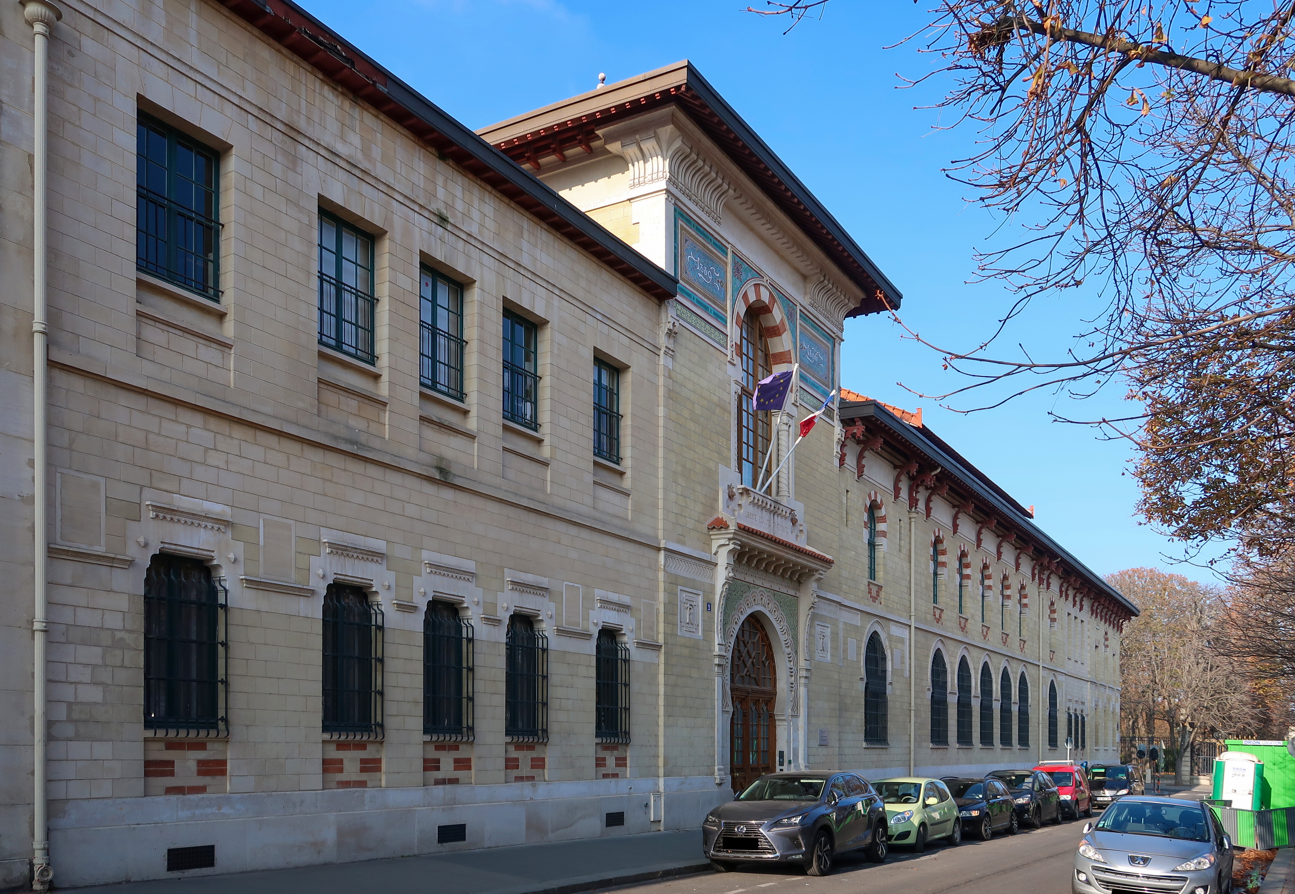 École nationale de la France d'outre-mer, 2 avenue de l'Observatoire (Paris, 6e).